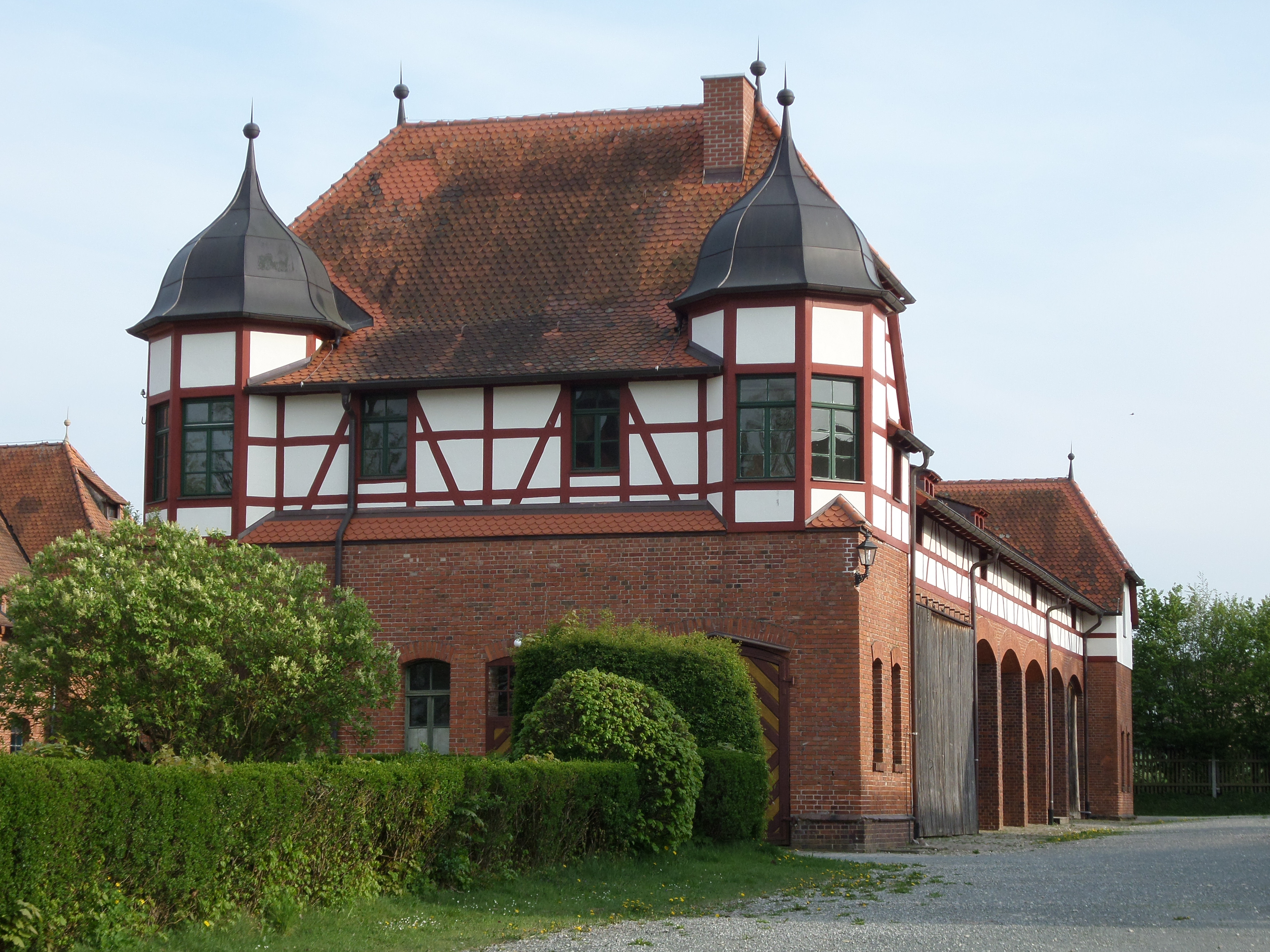 Gut Wolfgangshof This is a photograph of an architectural monument.